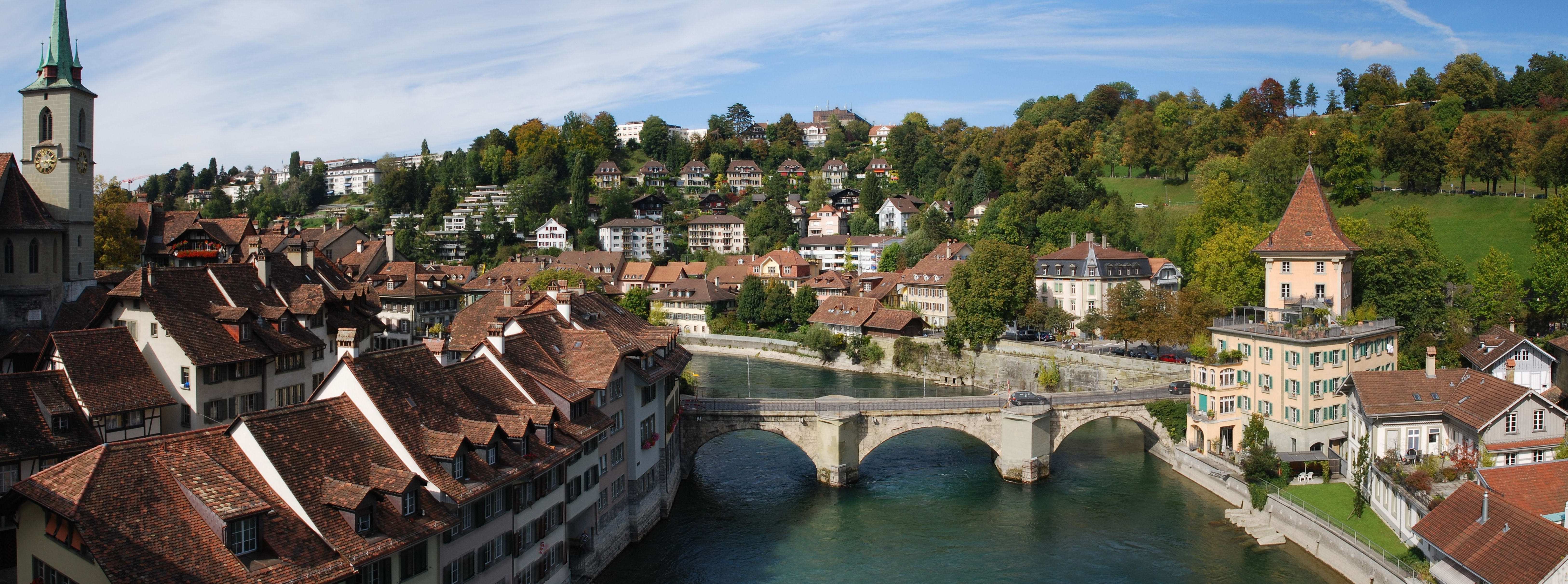 Panorama von der Nydeggbrücke in Bern, Blick auf die Untertorbrücke